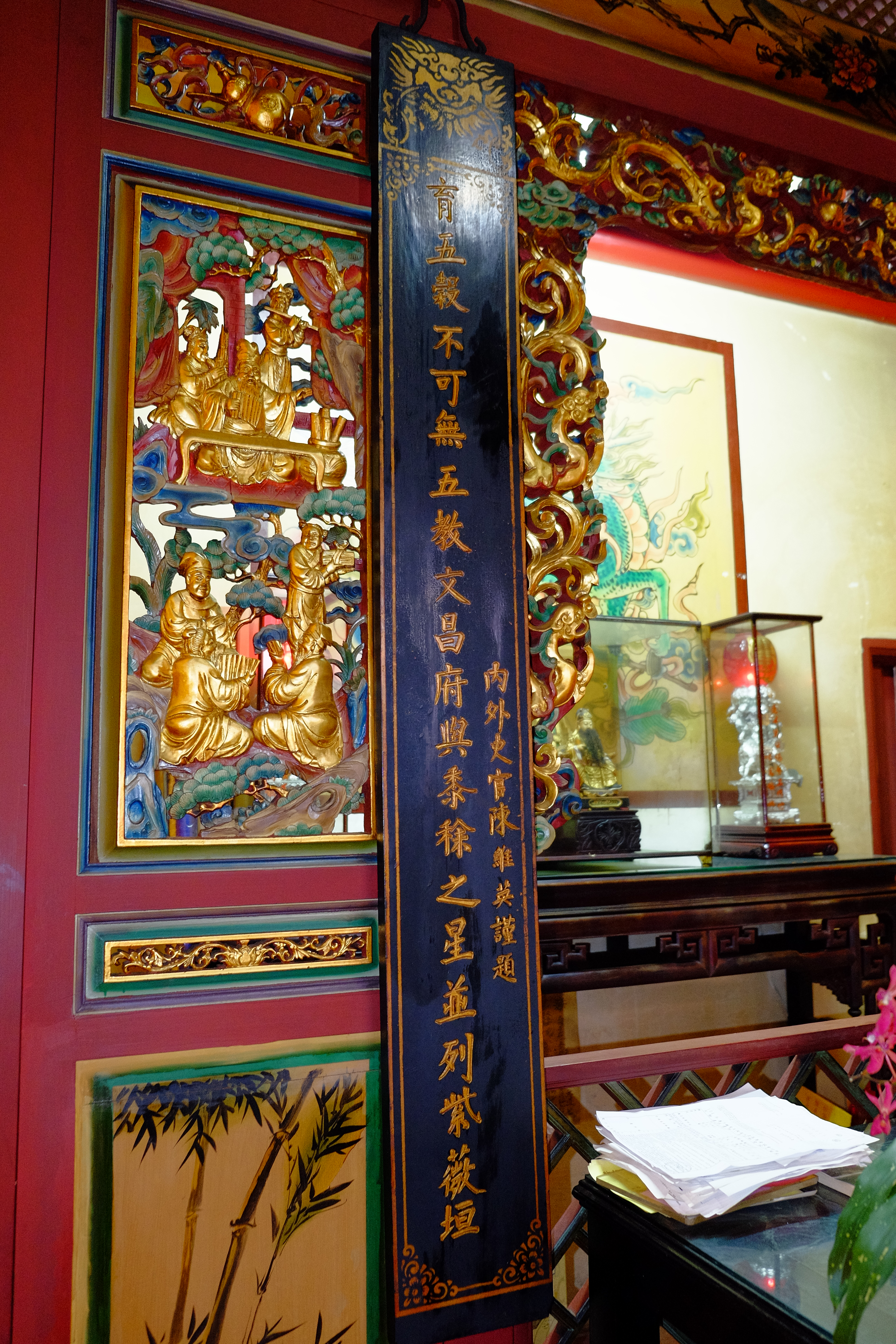 育五榖。不可無五教。文昌府與黍稔之星。並列紫微桓